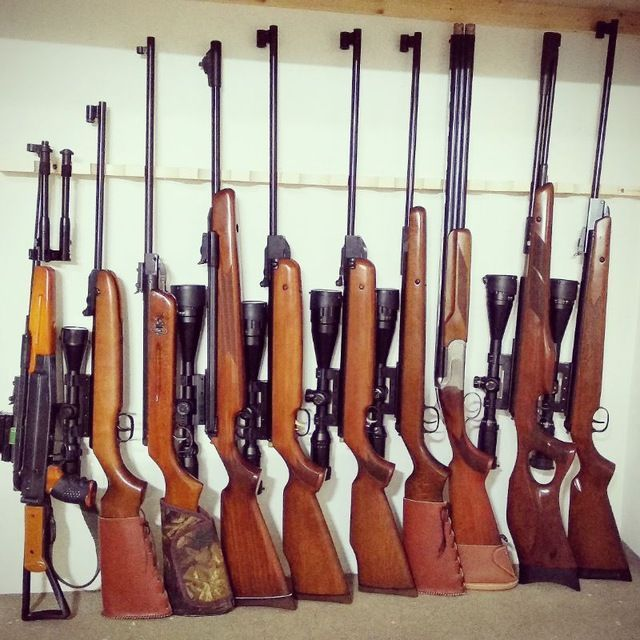 مجموعه ای از تفنگهای مختلف